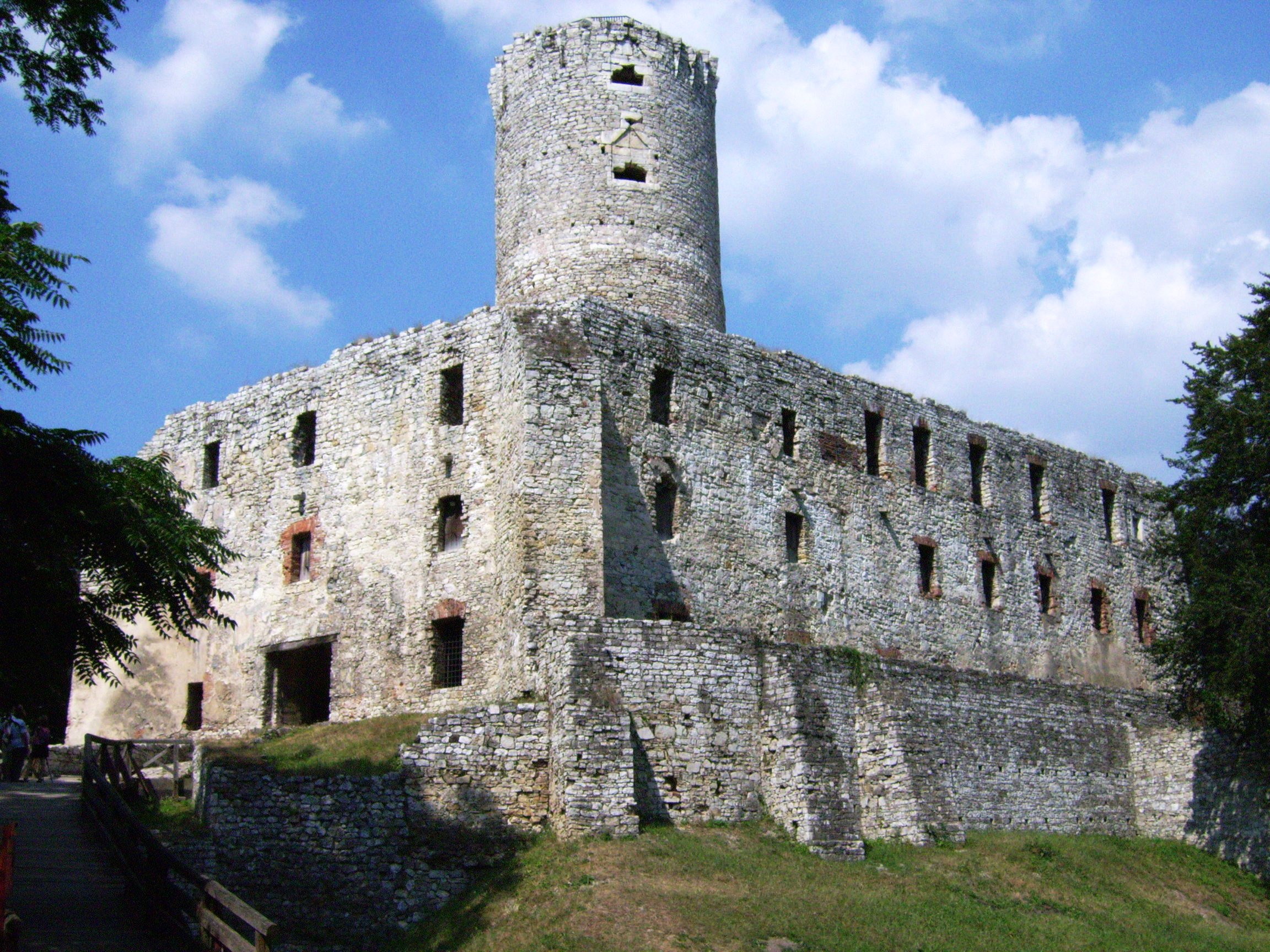 Zamek Lipowiec. (zabytek nr rejestr. A/686/M)